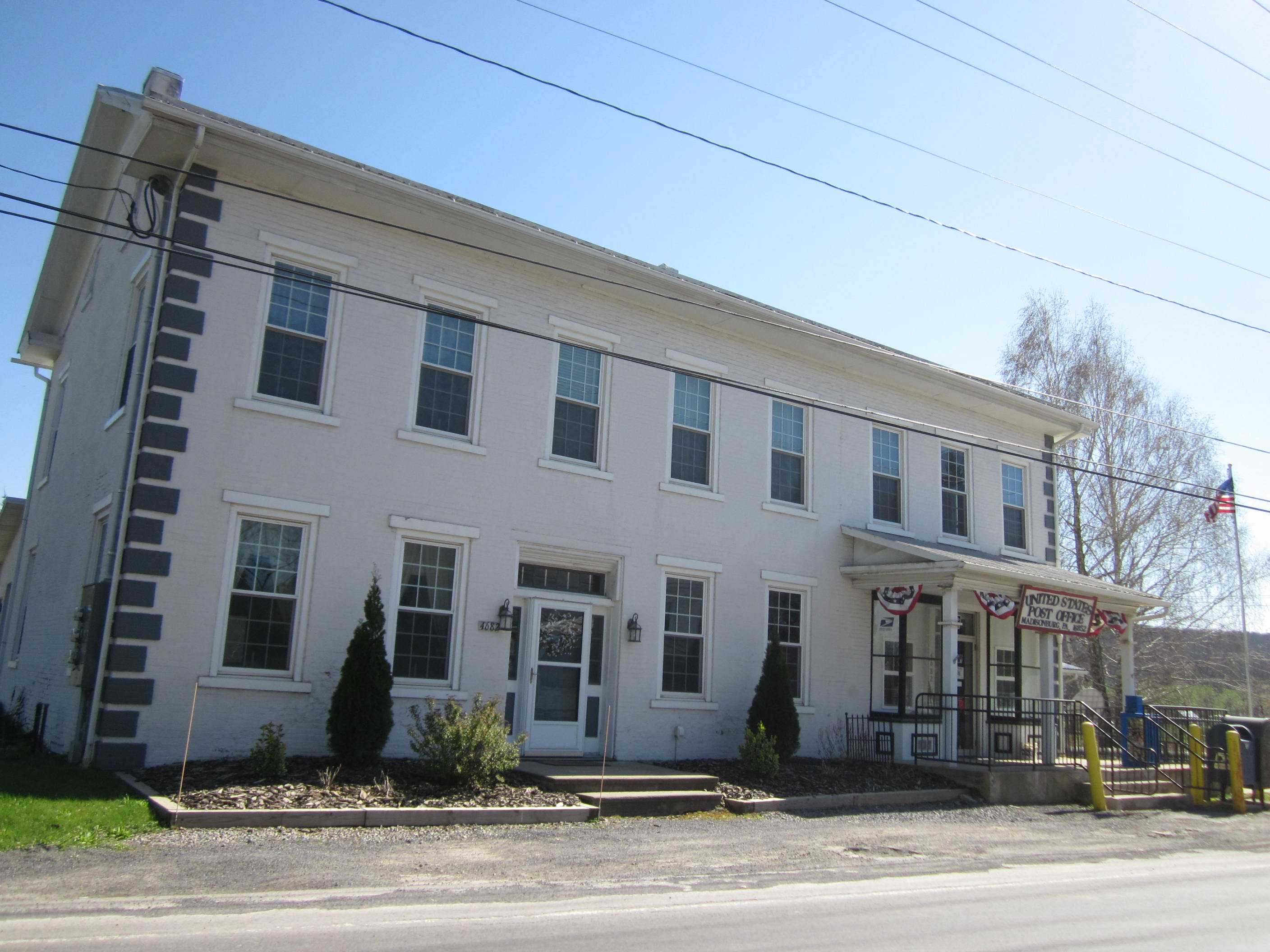 Madisonburg, Pennsylvania